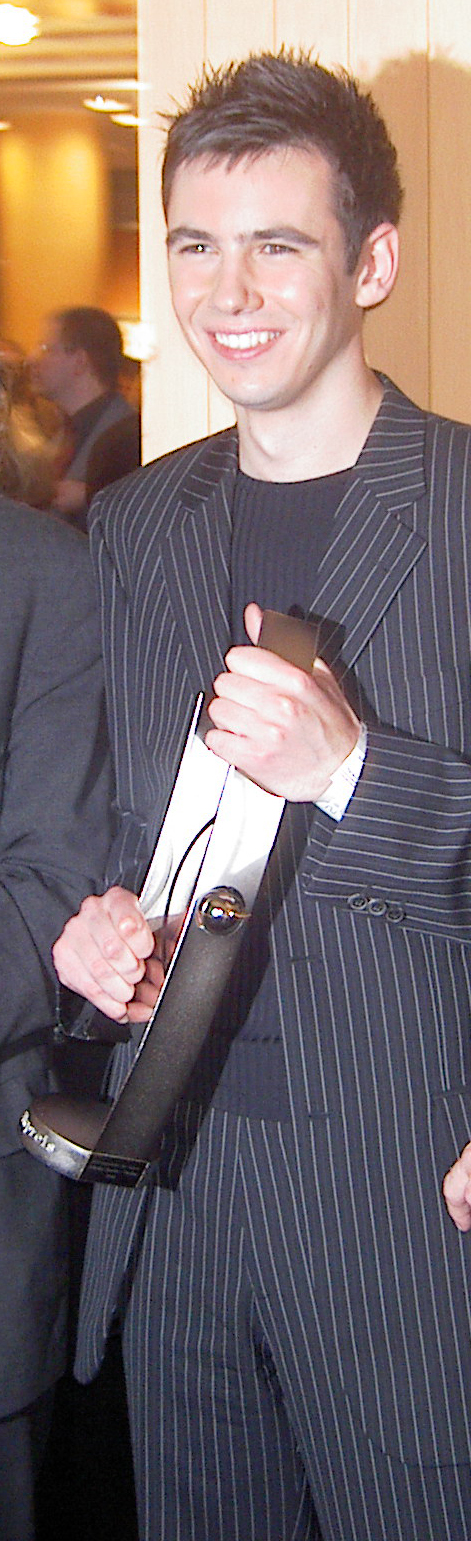 Martin Stadtfeld auf der Echo-Klassik-Party im Oktober 2004